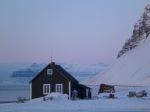 Fangtsstasjonen Freheim på Spitsbergen, som ble etablert av Fangstfamilien Nøis tidlig på 1900 tallet. På bildet ser en bakerst Daniel bua, oppkalt etter fangsmannen & ishavsskipper Daniel Nøis , og foran hovedstasjonen Fredheim bygget av fangstmannen Hilmar Nøis